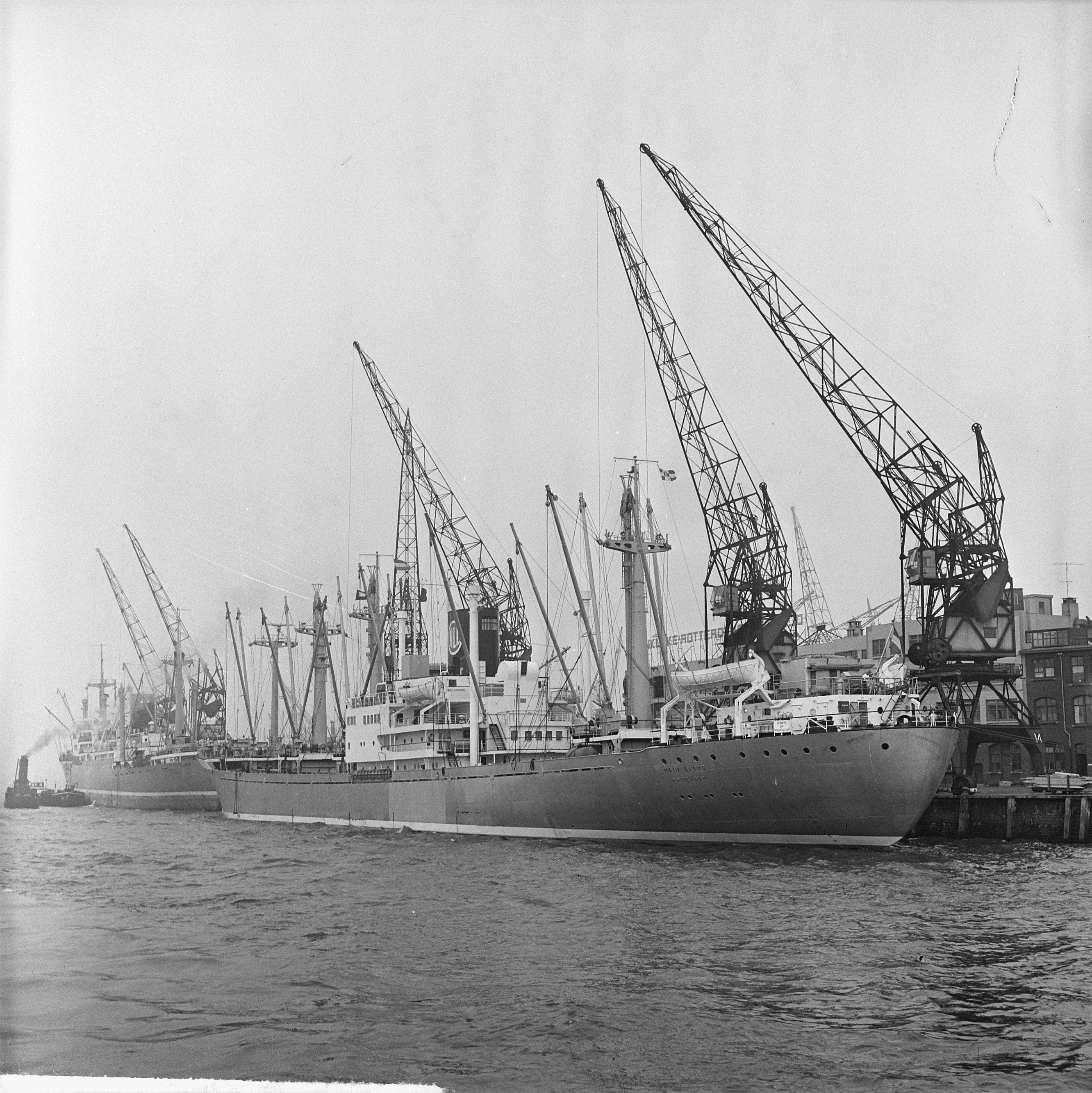 Collectie / Archief : Fotocollectie Anefo Reportage / Serie : [ onbekend ] Beschrijving : De haven van Rotterdam Datum : 22 april 1964 Locatie : Rotterdam, Zuid-Holland Trefwoorden : havens Fotograaf : Koch, Eric / Anefo Auteursrechthebbende : Nationaal Archief Materiaalsoort : Negatief (zwart/wit) Nummer archiefinventaris : bekijk toegang 2.24.01.03 Bestanddeelnummer : 916-3359 Reacties Geplaatst door Larry Dutch op 06 februari 2016 - 14:58. Lloydkade - schepen Kon. Rotterdamse Lloyd - dienst Nedlloyd Lijn. (NLL).